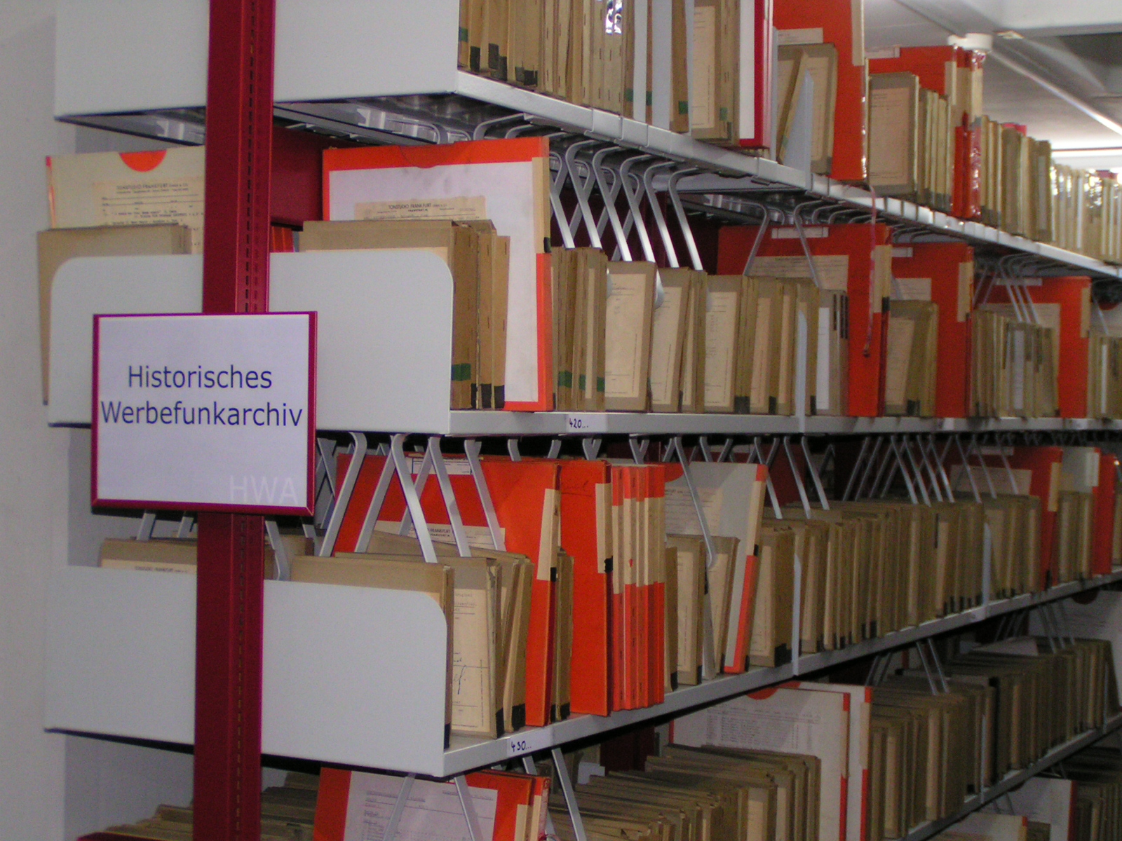 Tonbandsammlung des HWA